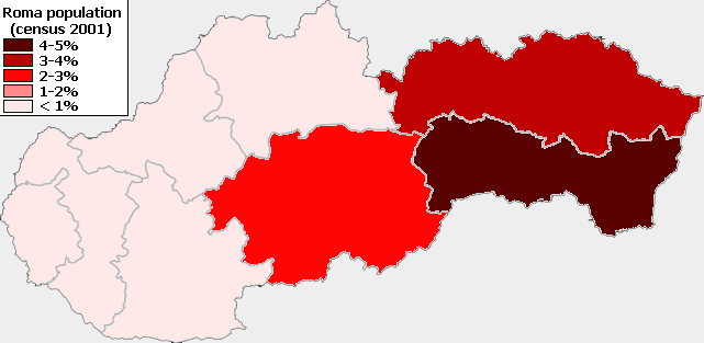 Roma minority in Slovakia